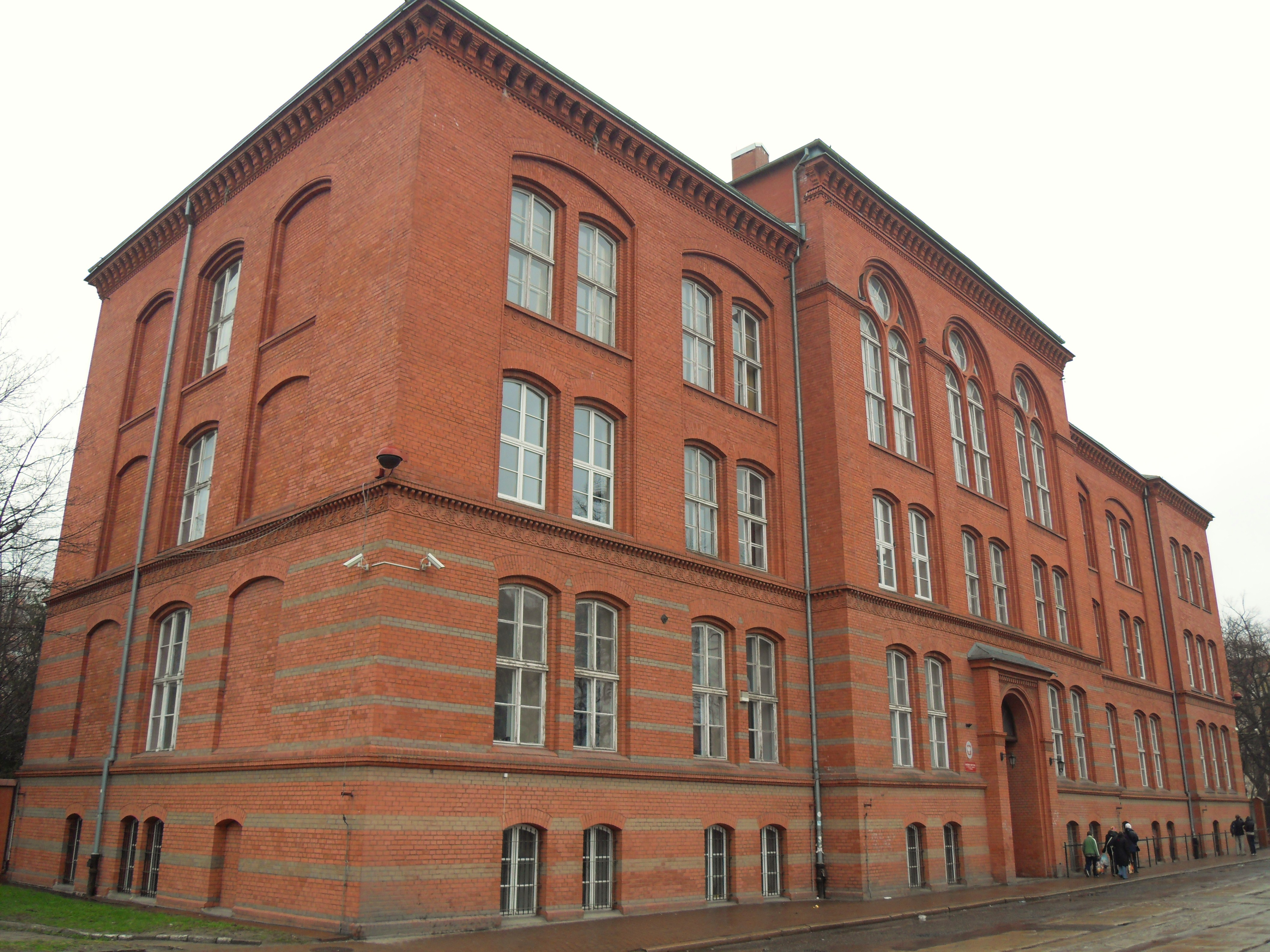 Gdańsk Długie Ogrody, ul. Łąkowa 1.